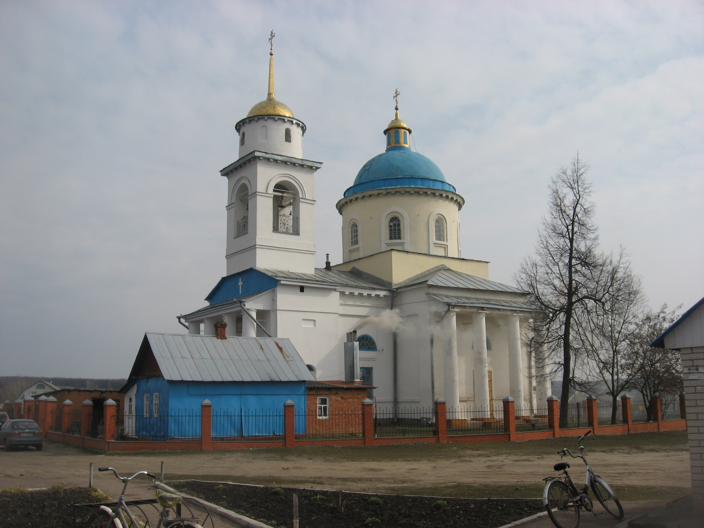 Свято-Димитріївська церква у селі Стецьківка